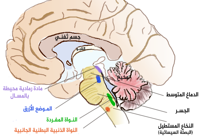 رسمة لمقطع عرضي للدماغ يوضح المناطق التي تحتوي على العصبونات نورأدرينالية الفعل في جذع الدماغ